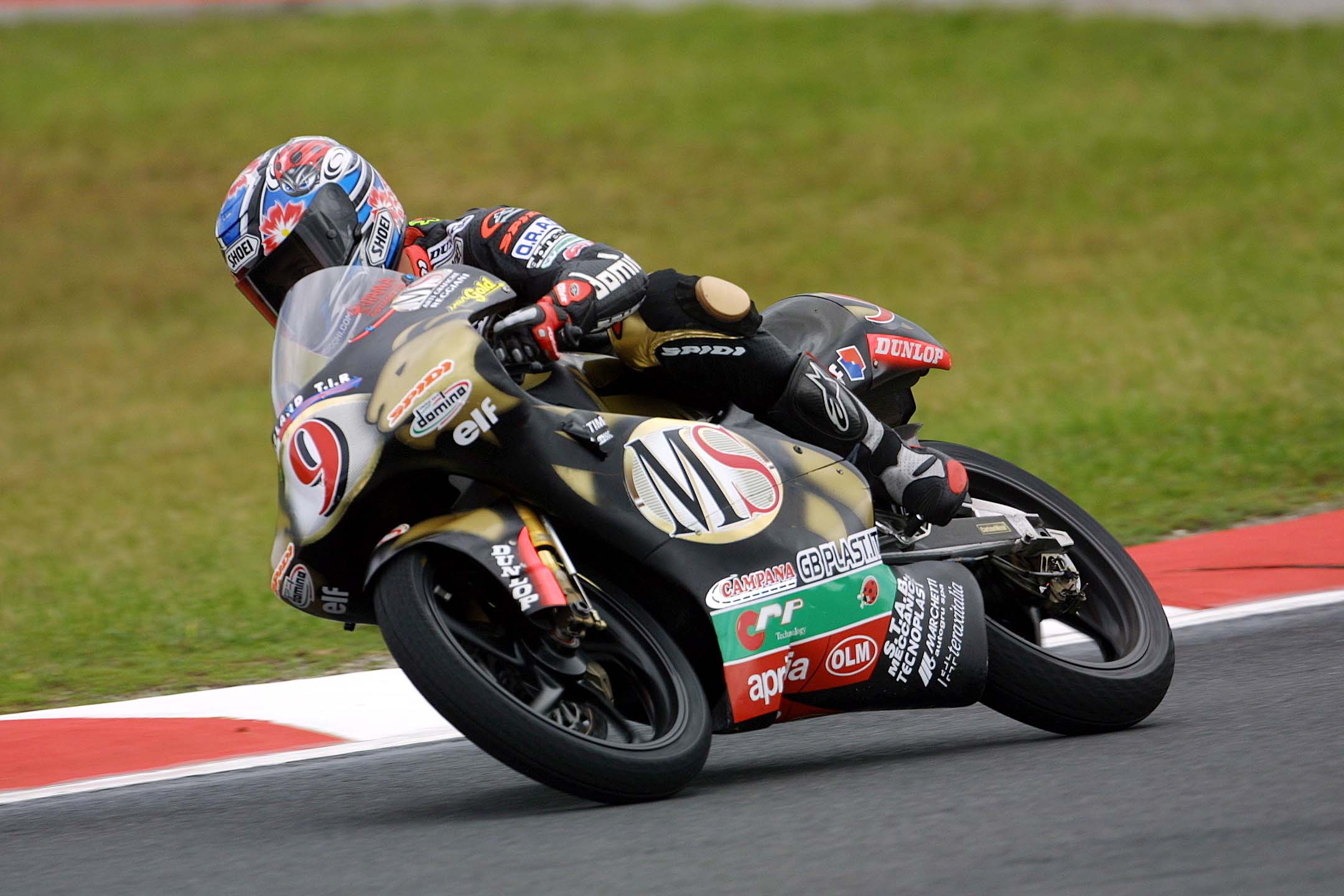 Lucio Cecchinello au guidon de son Aprilia lors du Grand Prix d'Australie 2001